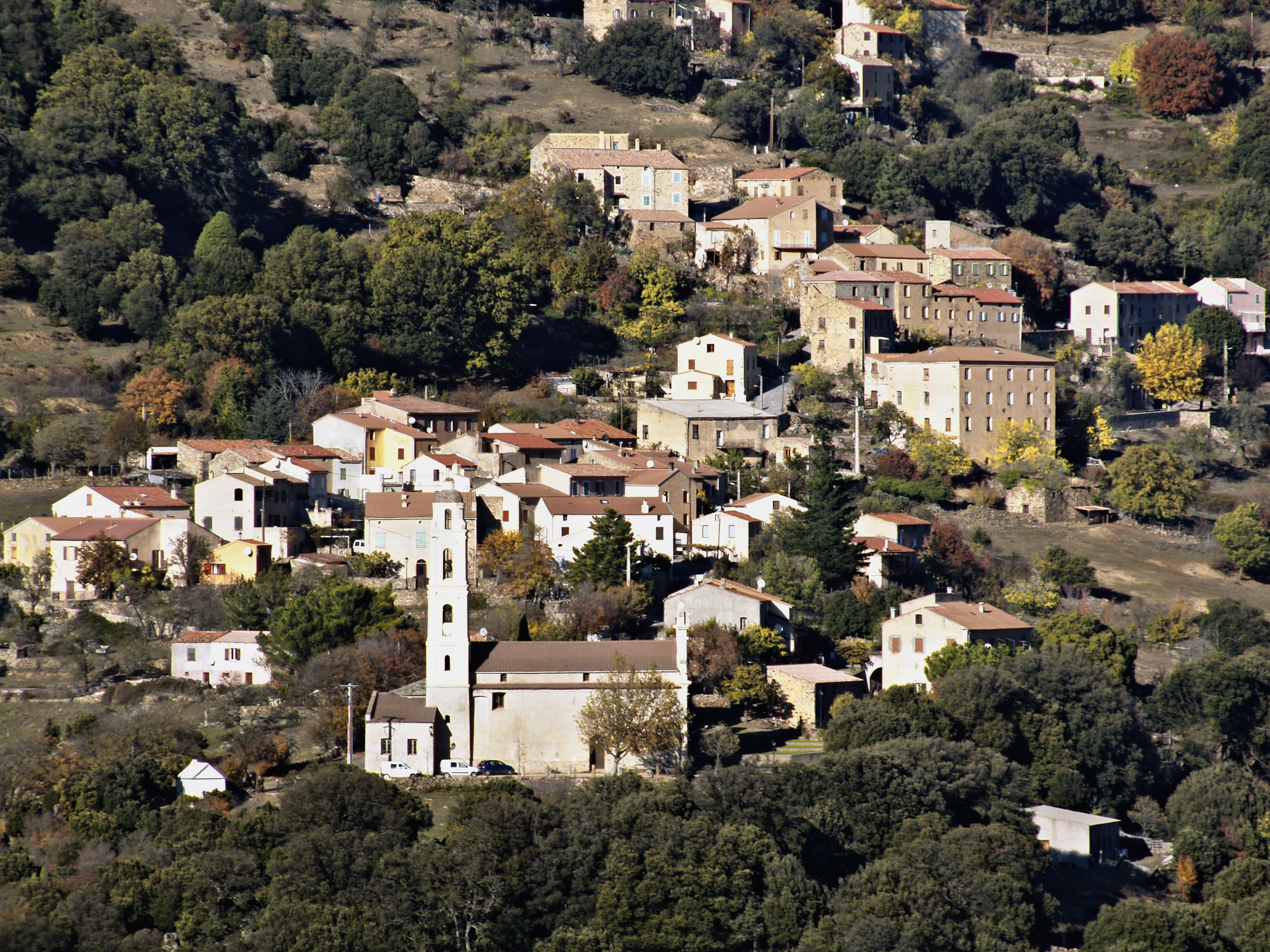 Olmi-Cappella (Corsica) - Vue du village